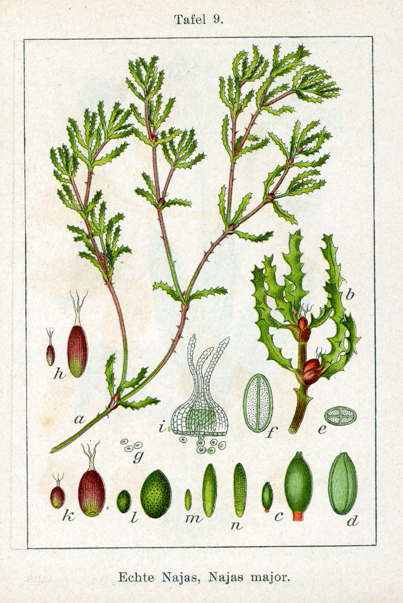 Najas marina subsp. marina, syn. Najas major All. original Description Echte Najas, Najas major